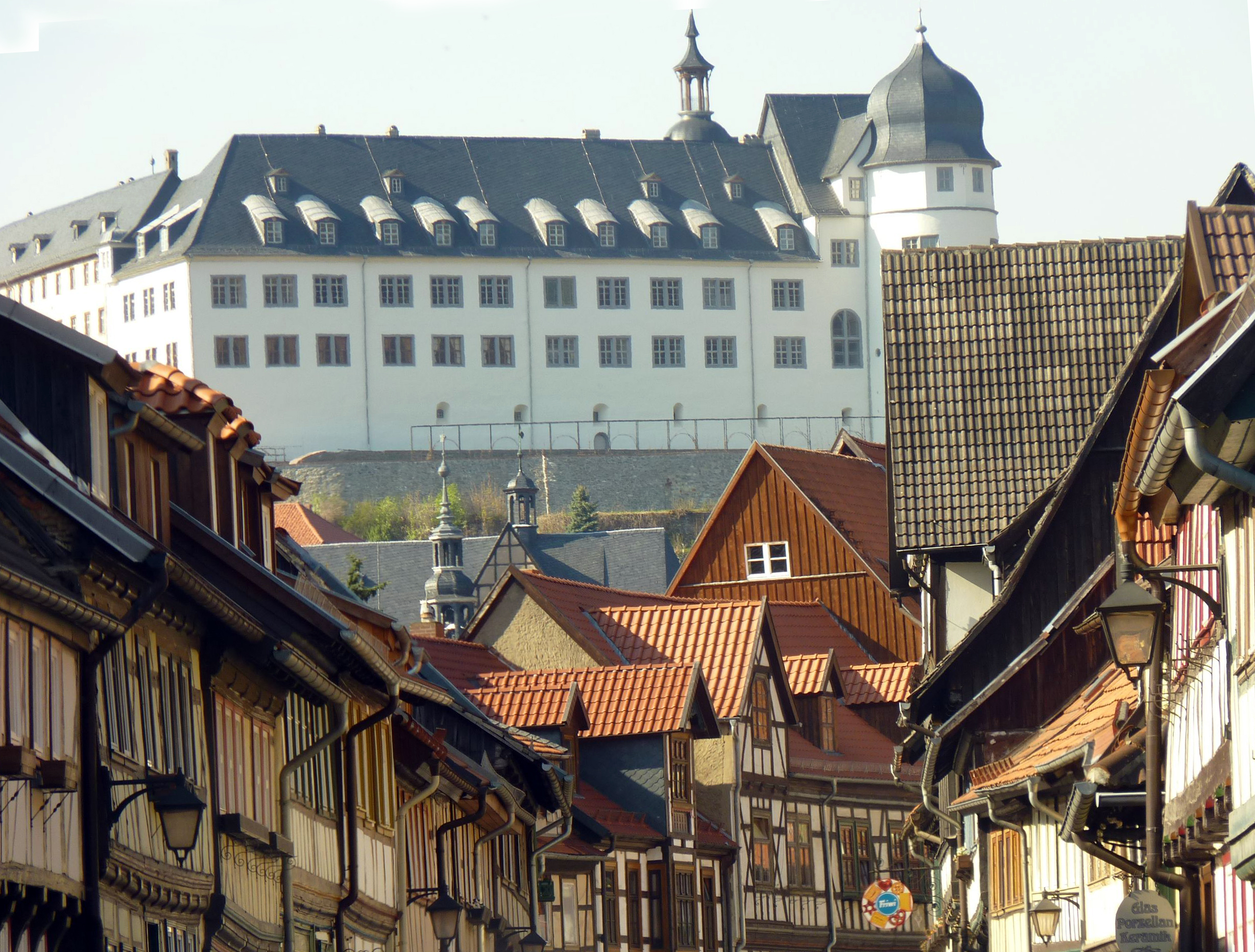 500 Jahre Fachwerkbau im Südharz in Stolberg, ein wunderschönes geschlossenes Ensemble, dominiert von dem Stolberger Schloss